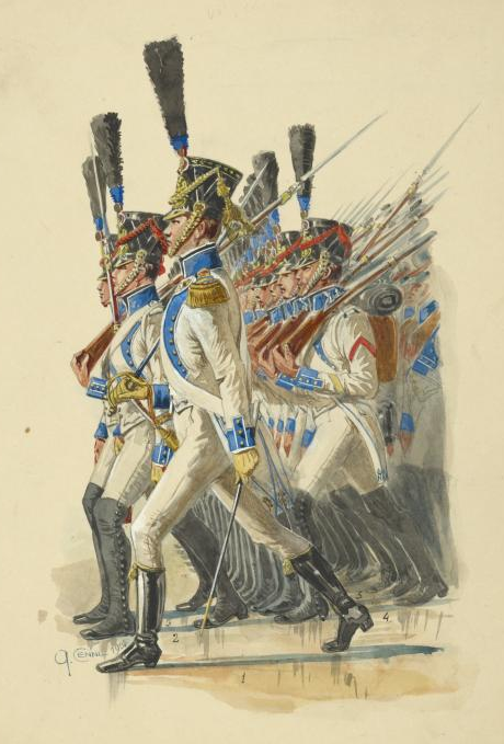 1º Reggimento Fanteria di Linea, Regno di Napoli 1812 Quinto Cenni 1908